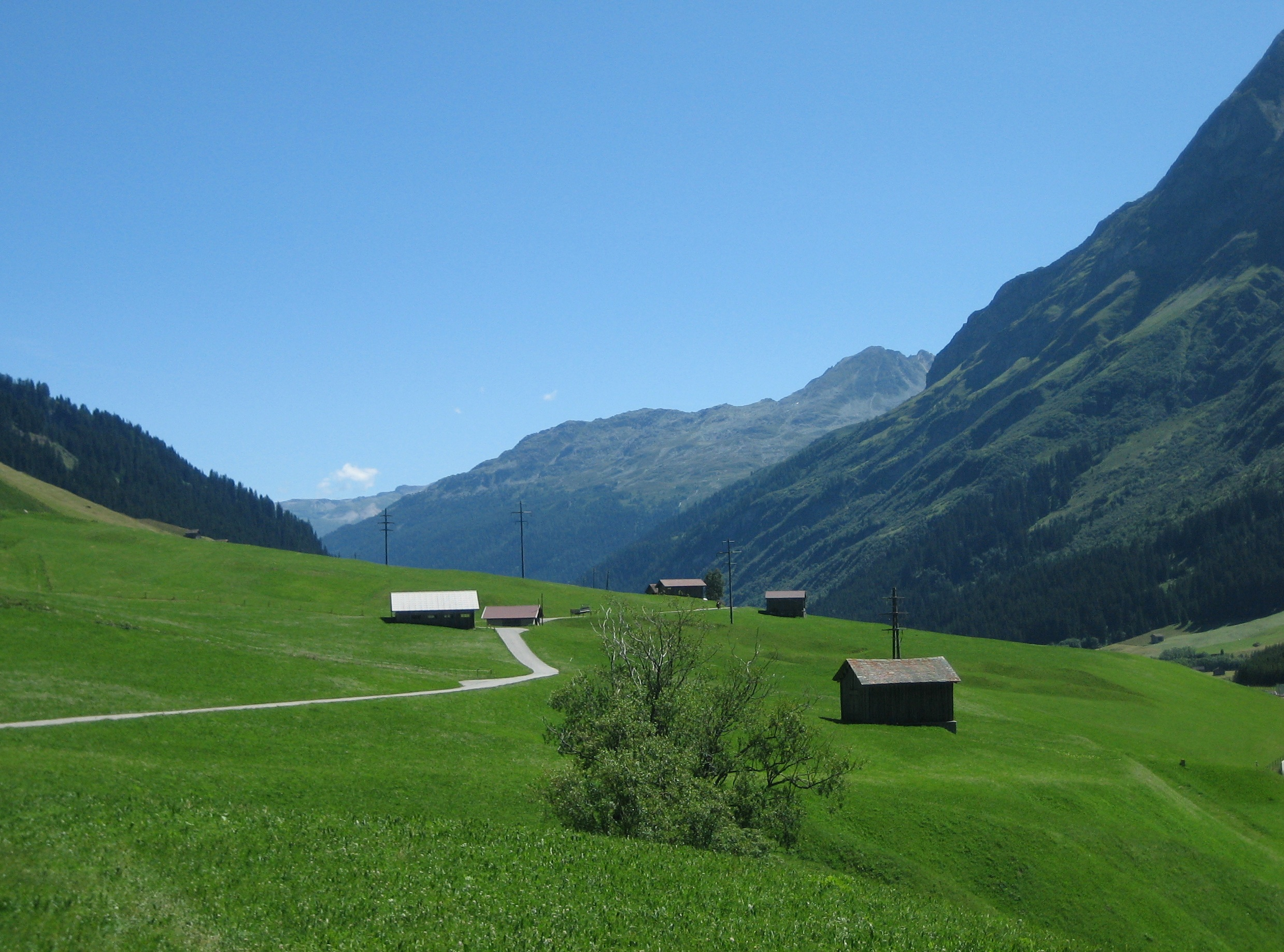 Rheinwald bei Hinterrhein